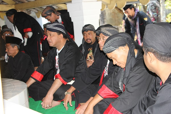 Bupati Ponorogo ke-17 dan para warok yang sedang berziarah ke makam Bathara Katong.